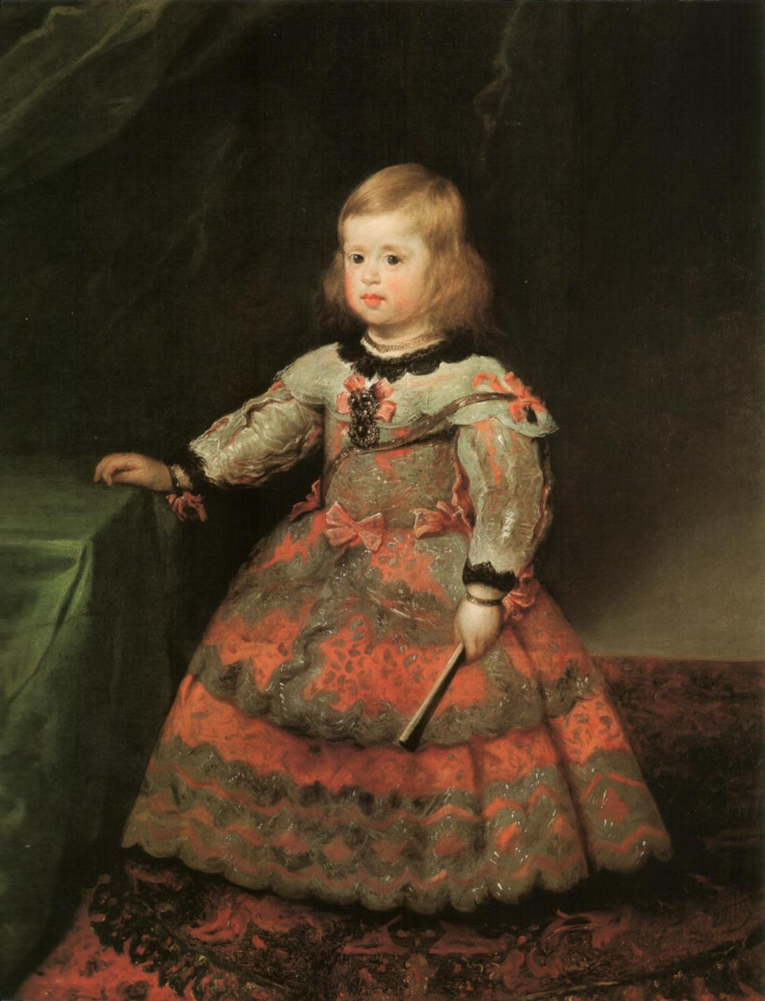 Velázquez: La infanta Margarita. Madrid, Palacio de los Duques de Alba. 1656